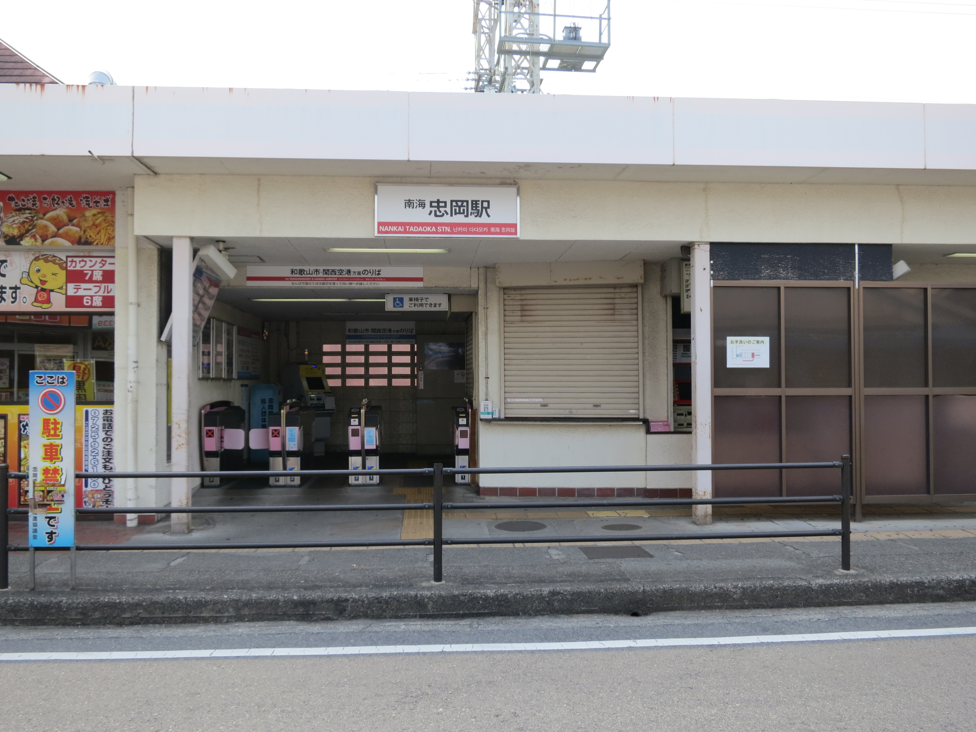 南海忠岡駅(和歌山市方面) Canon PowerShot S100